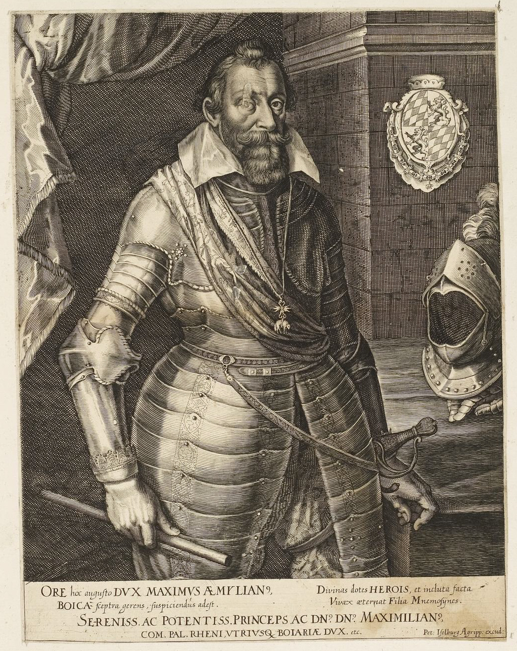 Grafik aus dem Klebeband Nr. 1 der Fürstlich Waldeckschen Hofbibliothek Arolsen Motiv: Kurfürst Maximilian I. von Bayern